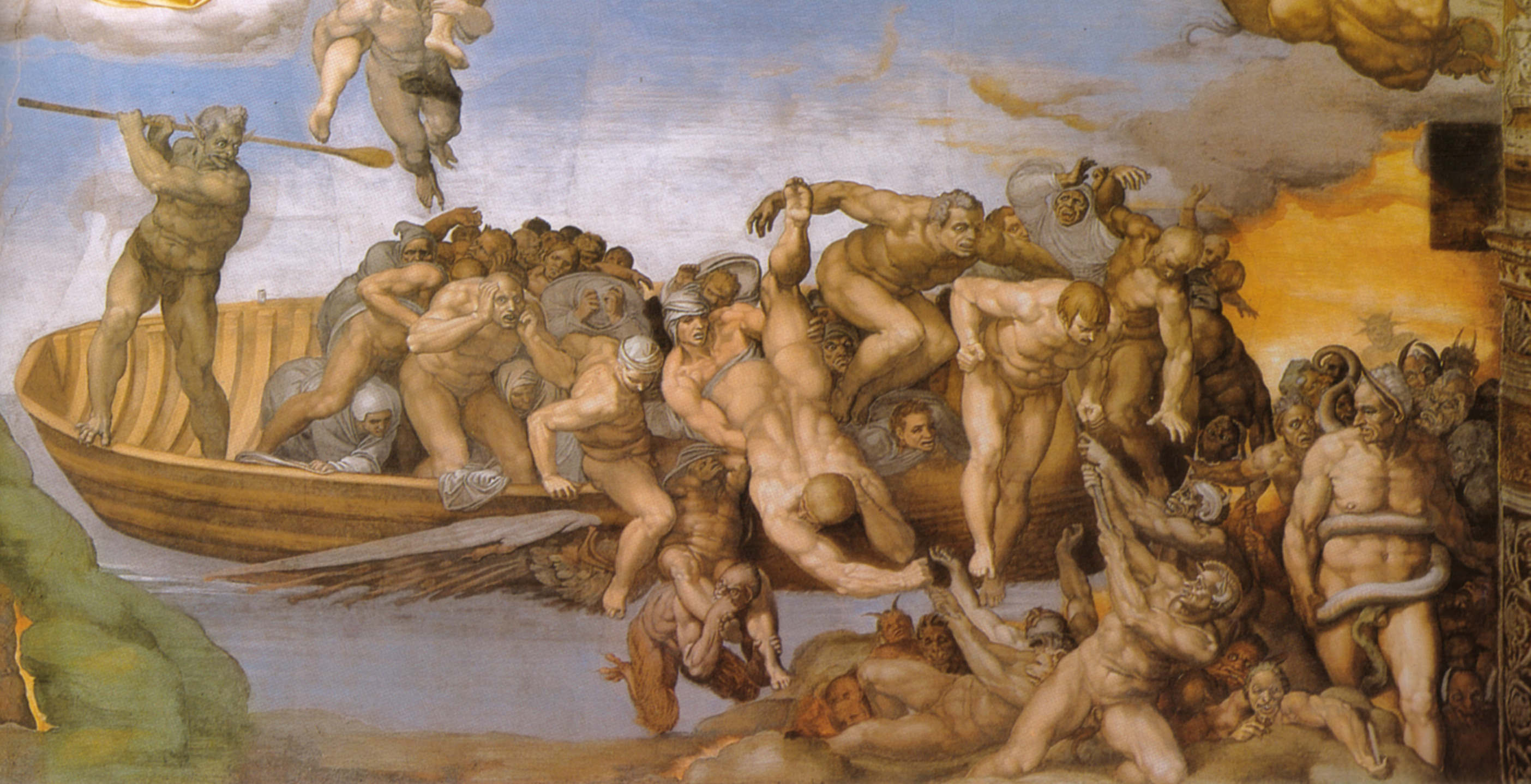 MICHELANGELO Buonarroti Last Judgment Fresco, 1370 x 1220 cm Cappella Sistina, Vatican